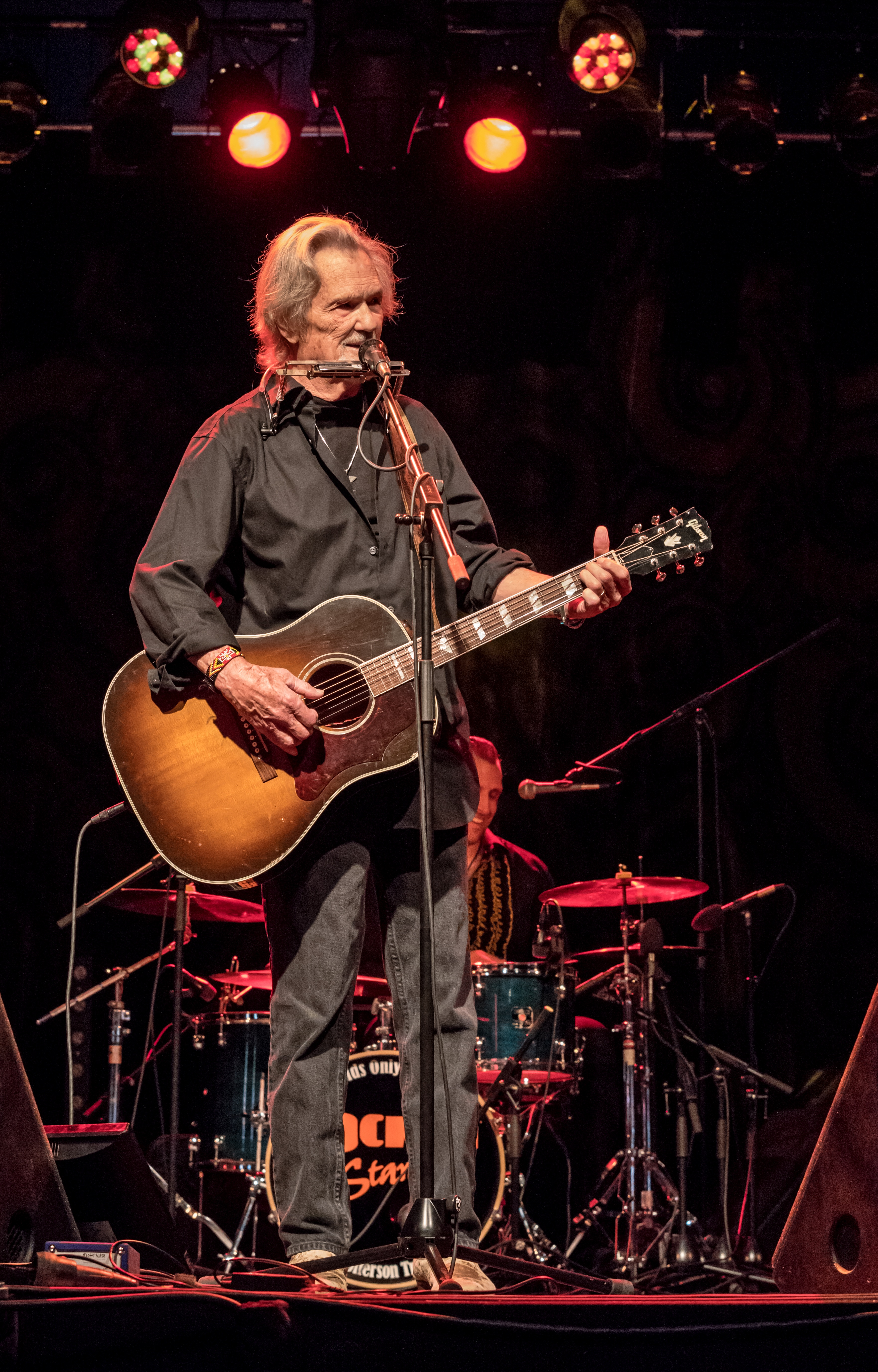 Bilder vom Zelt Musik Festival 2017 in Freiburg im Breisgau Kris Kristofferson